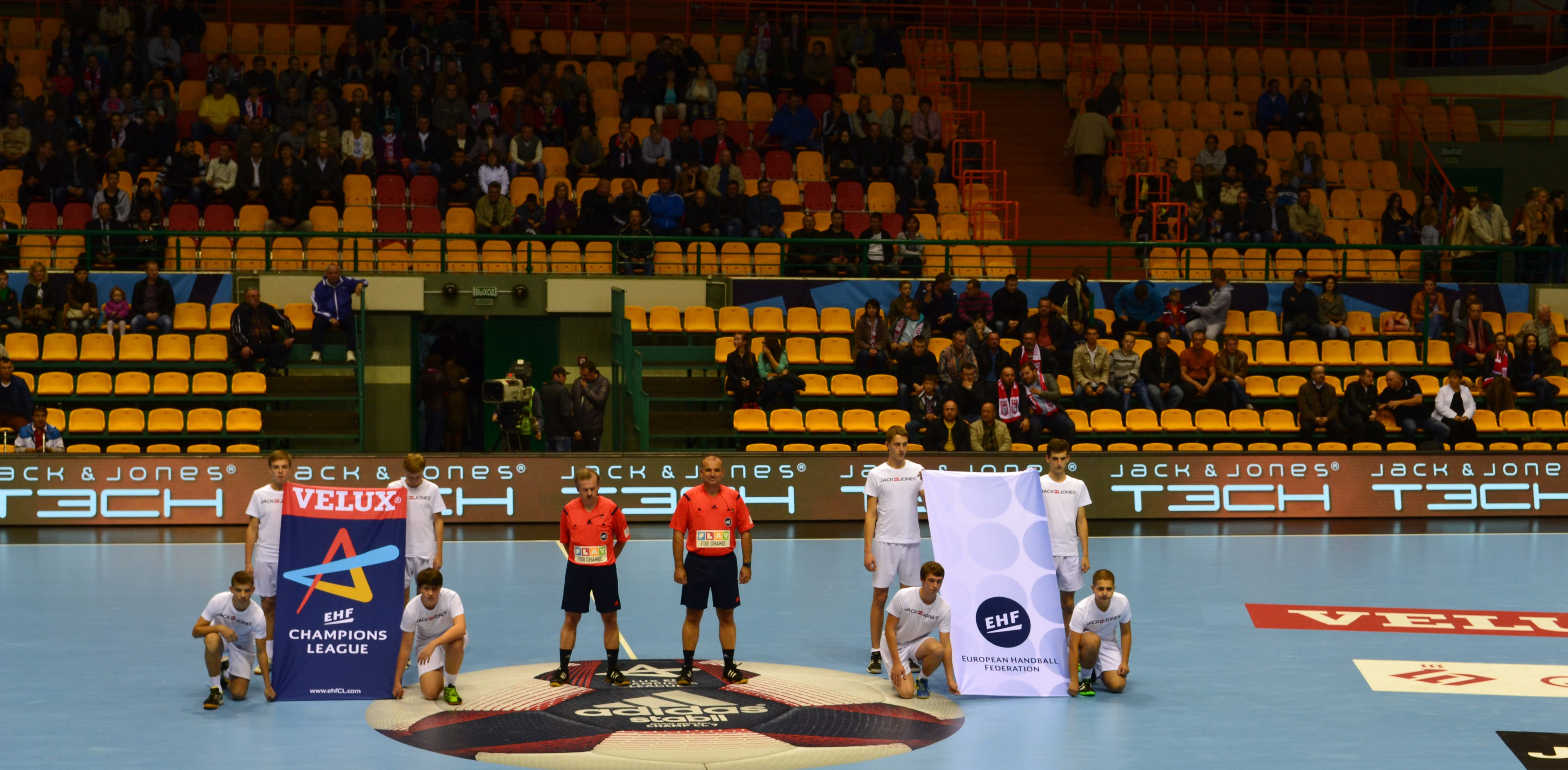 Беларуская (тарашкевіца): Матч Лігі чэмпіёнаў паміж берасьцейскім клюбам «БГК імя Мяшкова» і «Мэталюргам» са Скоп’е.